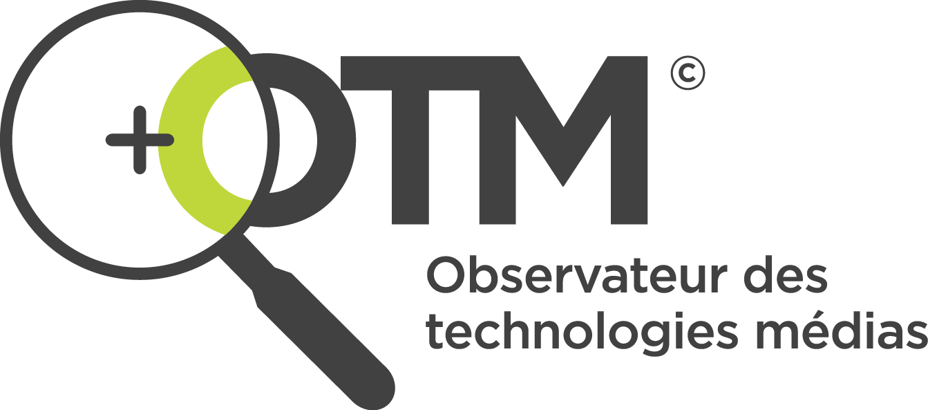 Logo officiel de l'Observateur des Technologies Media, crée par Marc Chartrand pour l'OTM.